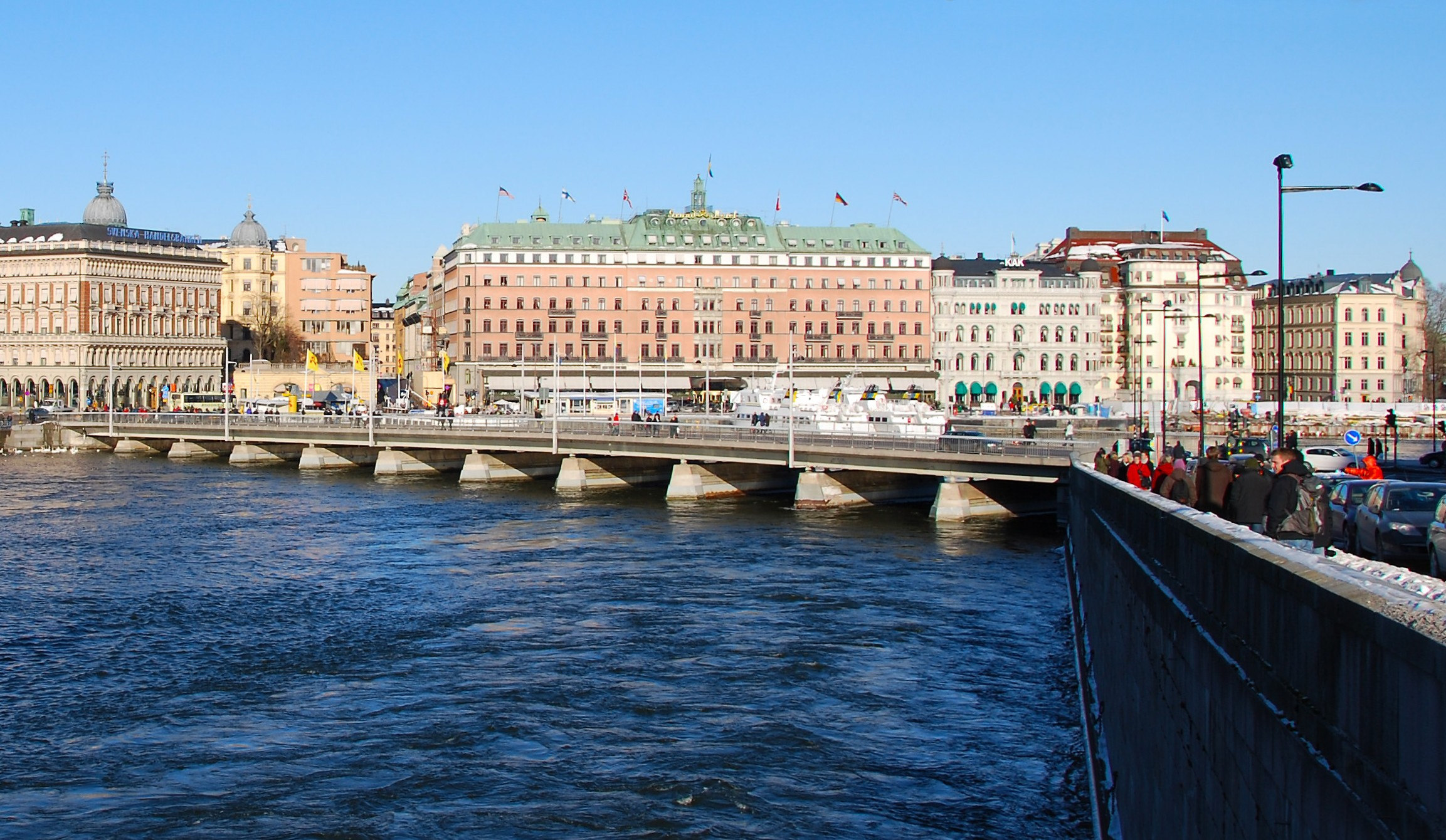 Norrström och Strömbron, sedd från Slottskajen i Stockholm